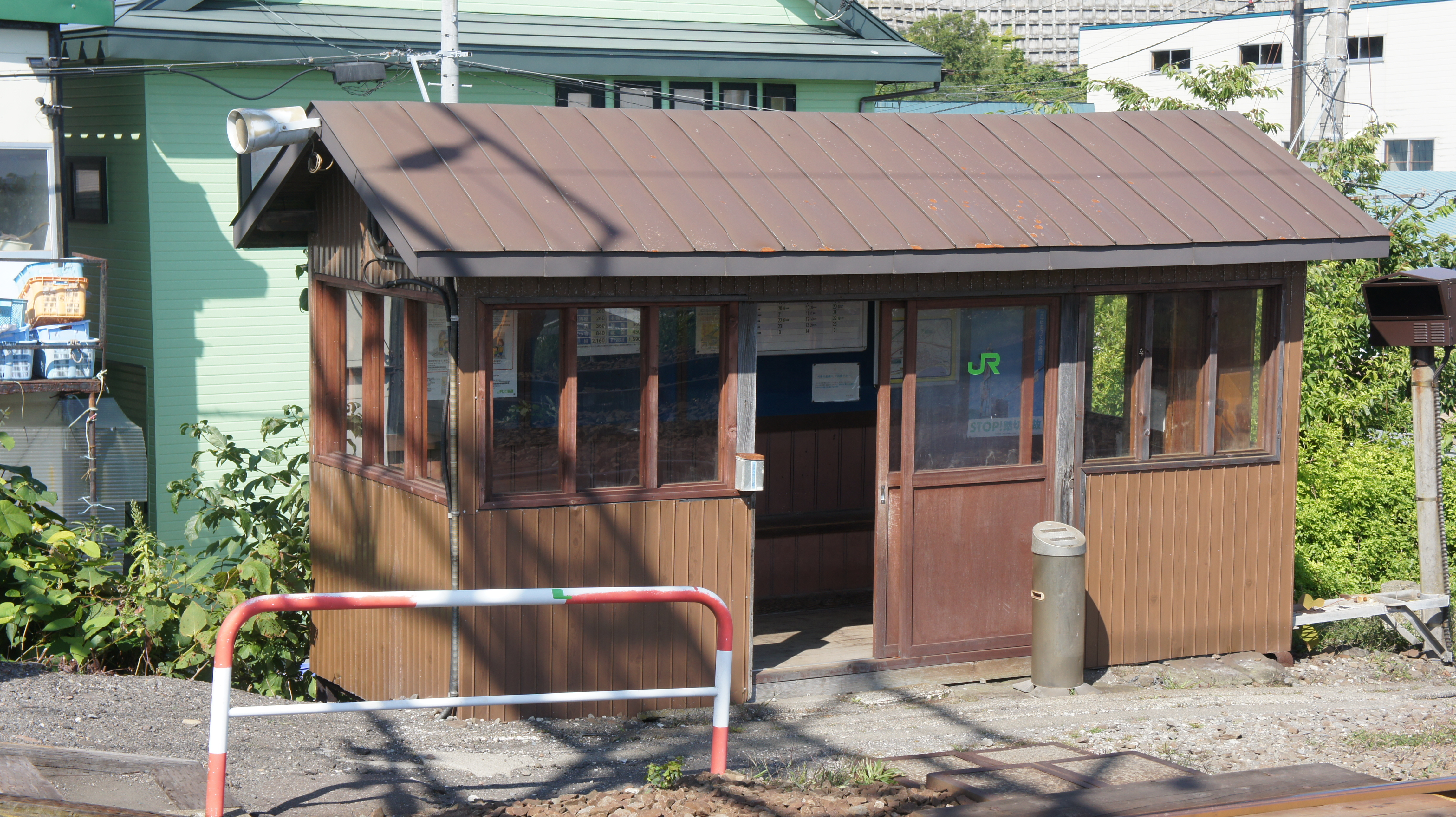 JR室蘭本線・富浦駅の待合室